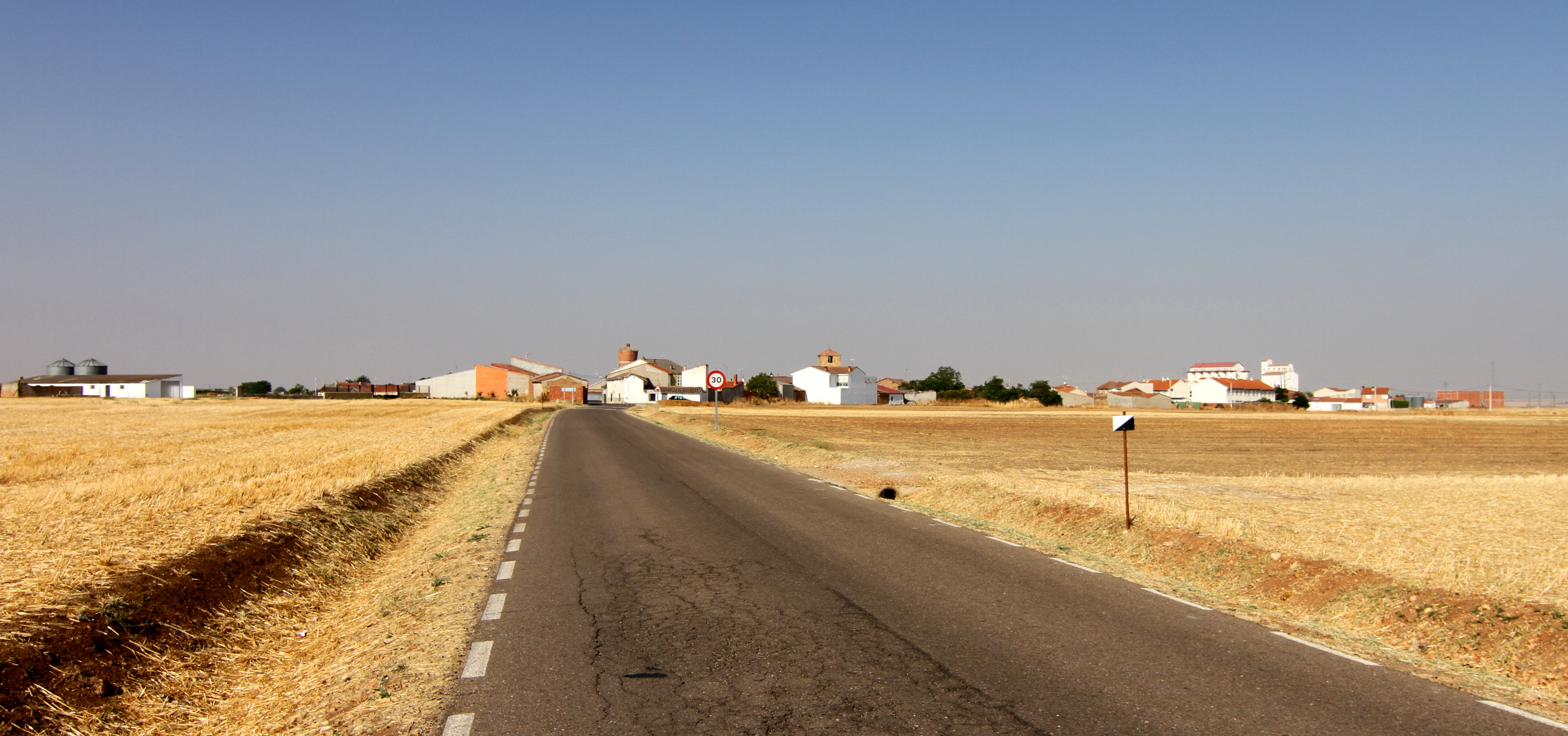 Gomecello, vista población desde el cementerio